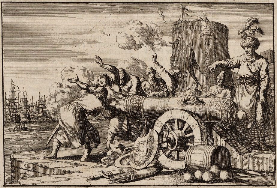 Gravure ancienne hollandaise. "Tijdens het Franse bombardement op Algiers wordt de Franse consul door de Algerijnen in een kanon geladen en gedood". En représailles au bombardement d'Alger par les Français, les Algériens attache le consul de France à la bouche d'un canon. Le supplicié est le vicaire apostolique Jean Le Vacher qui est projeté sur le navire-amiral de Duquesne le 26 juillet 1683.